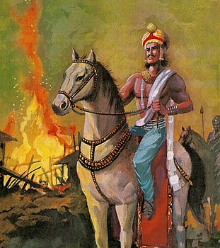 bindusar's sketch